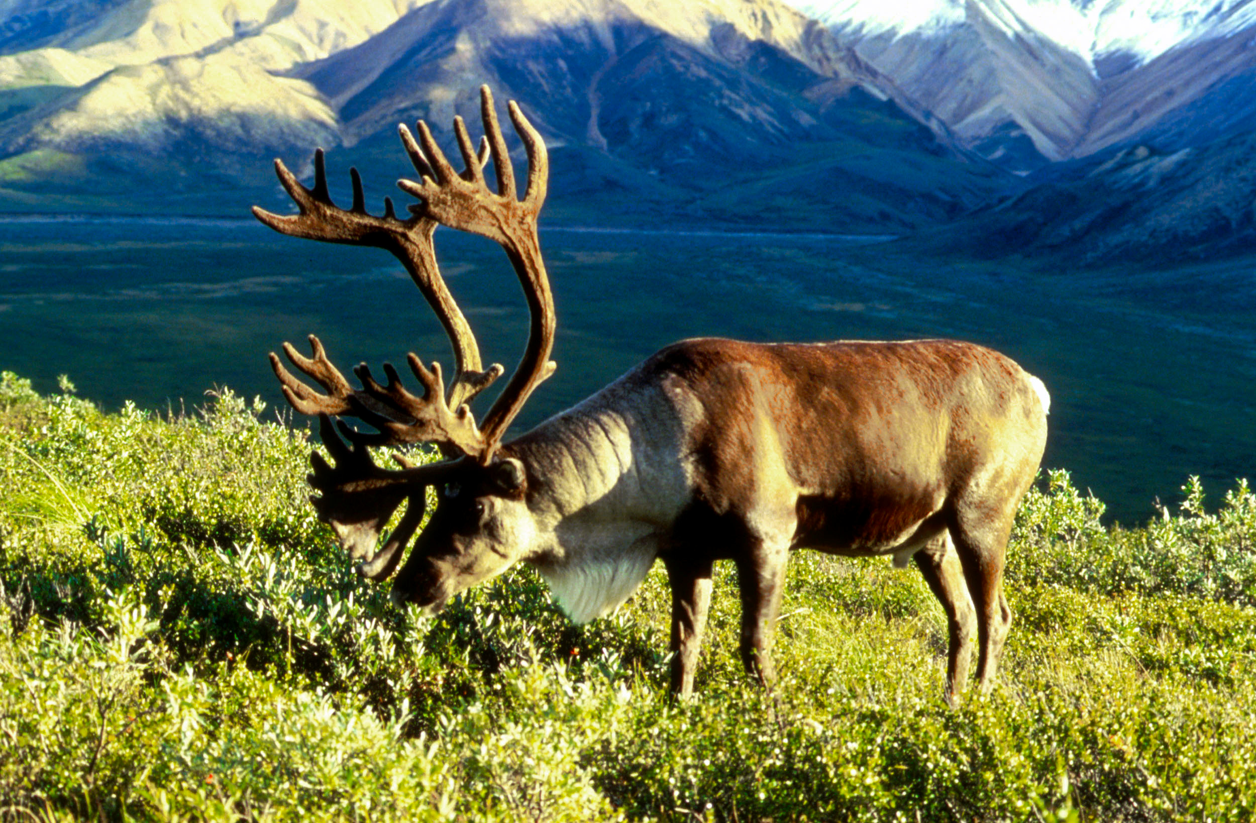 Male caribou in Alaska